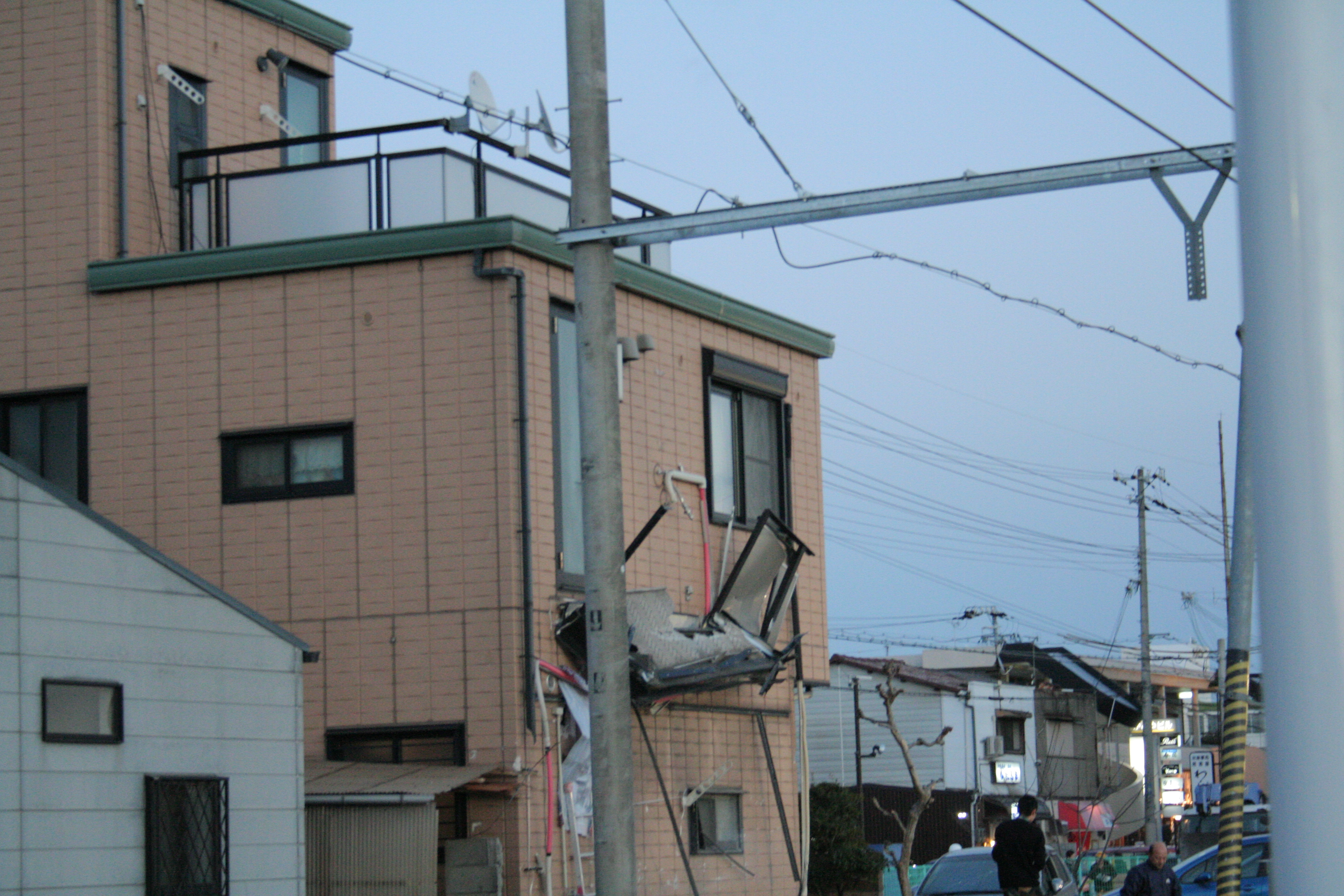 2013年2月12日。日本国兵庫県高砂市山陽電鉄本線荒井駅西側にて発生した特急列車脱線事故の写真。